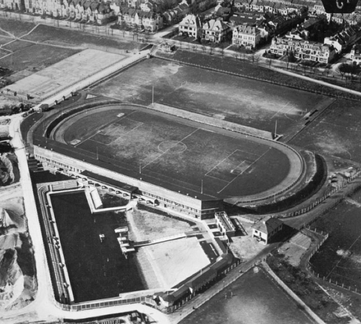 Das Weserstadion (zwischenzeitlich „ATBS Kampfbahn“ und „Bremer Kampfbahn“ genannt) im Jahre 1928.